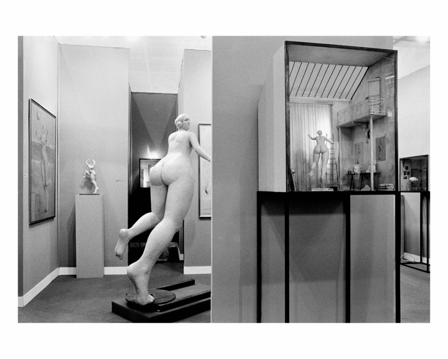 Série d'oeuvres autour de "La Grande Lulu", Fiac 2000